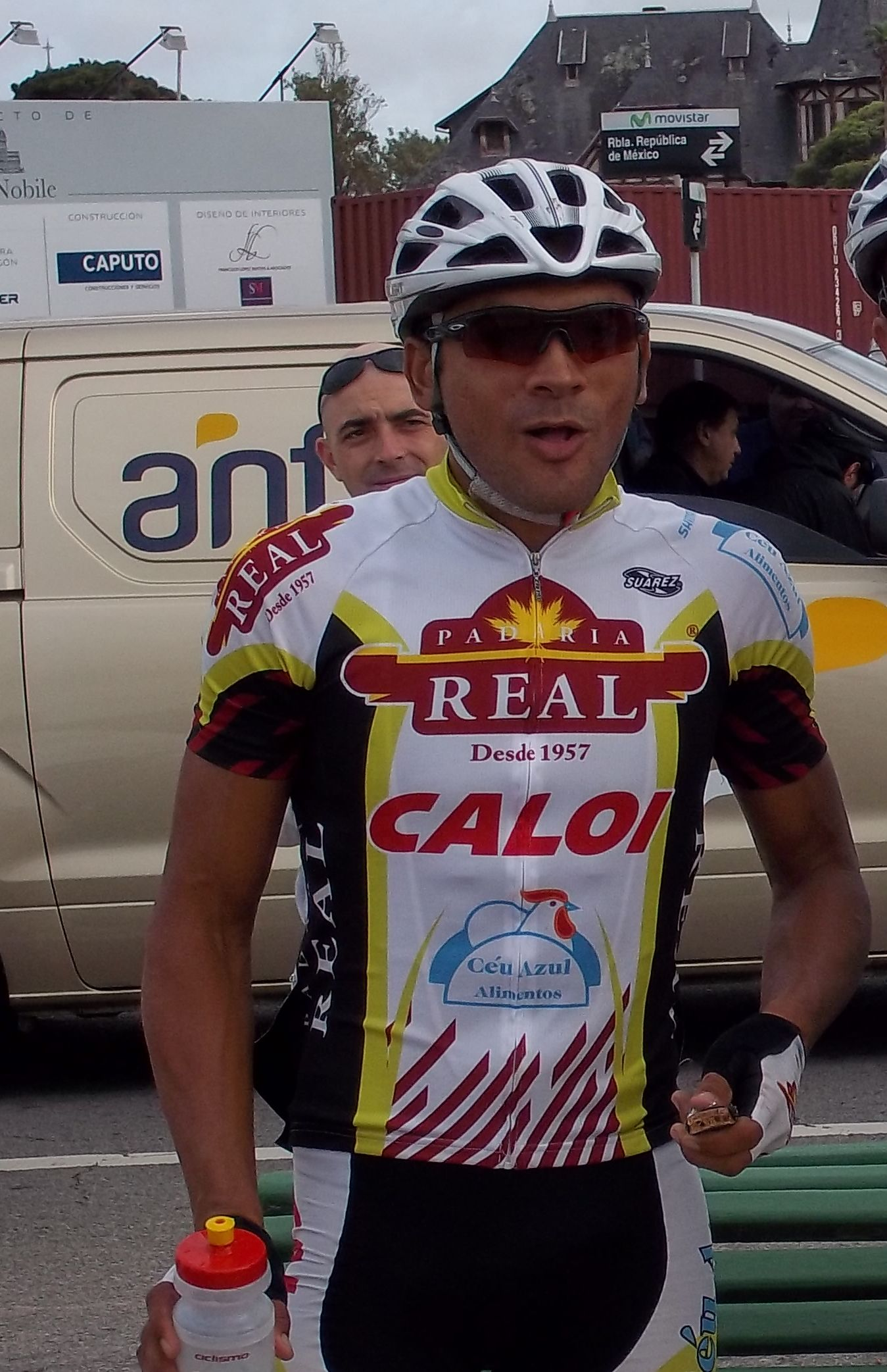 Ciclista brasileño José Eriberto Rodrígues del equipo Real Cycling Team